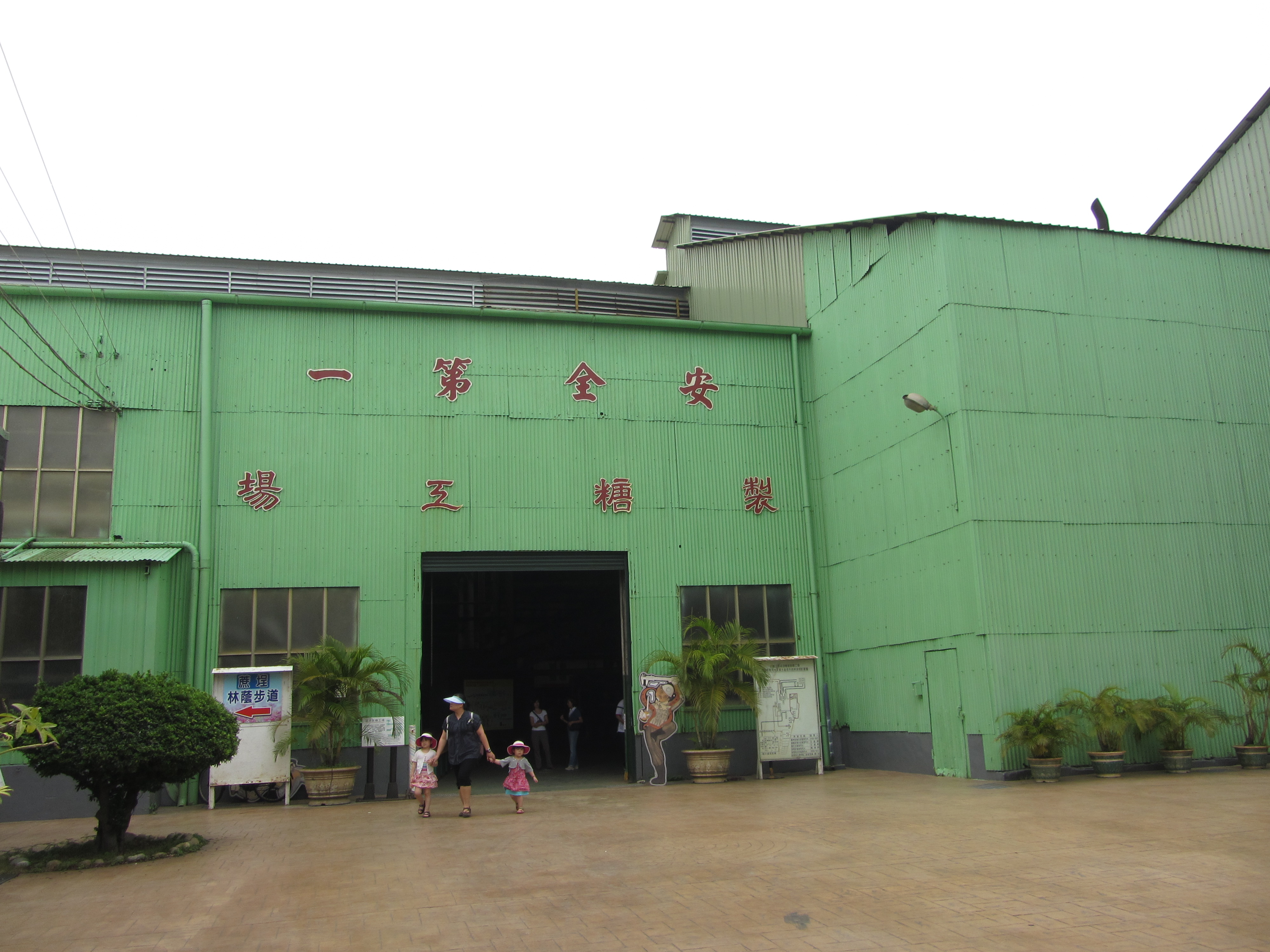 溪湖糖廠製糖工場